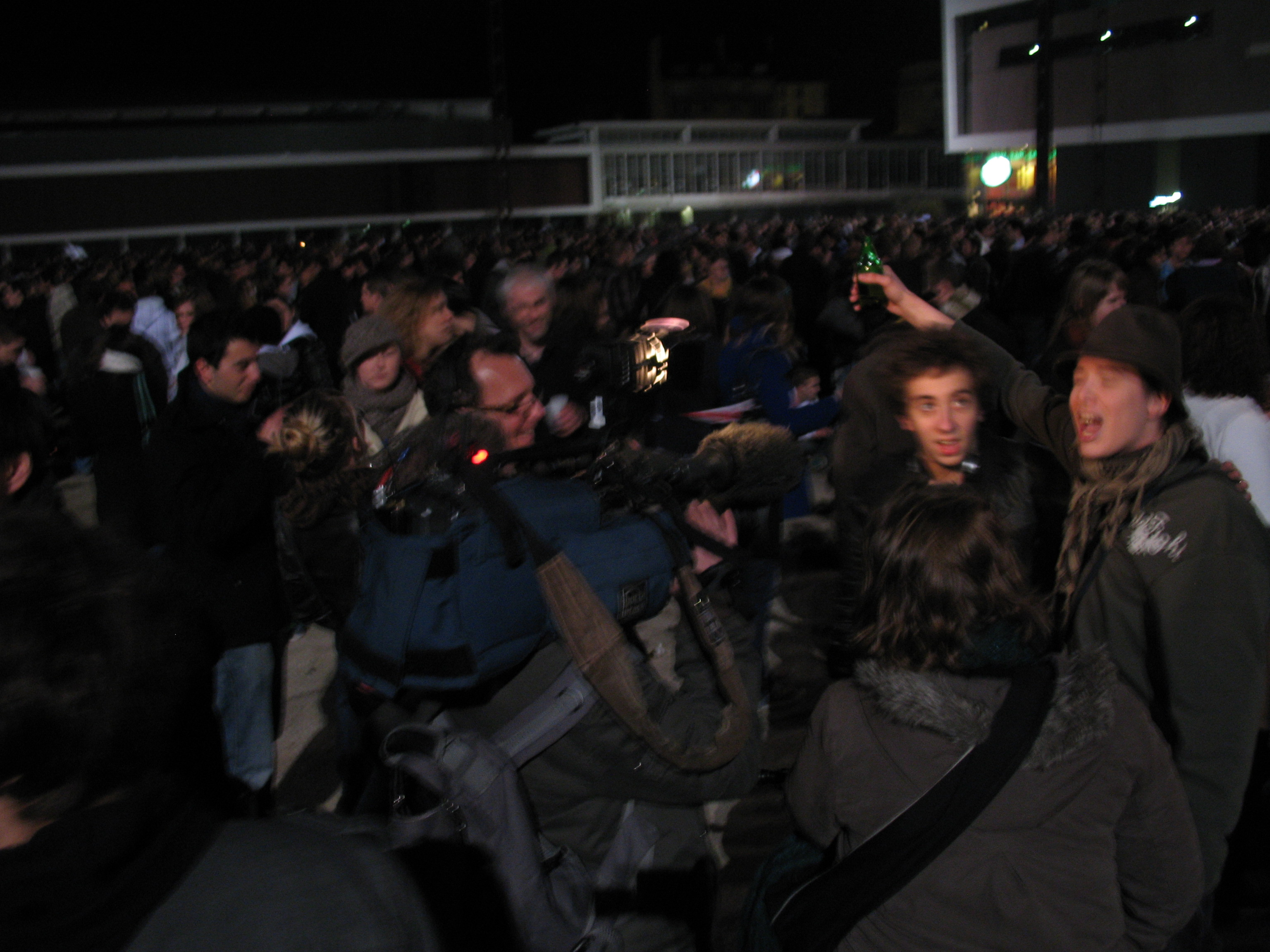 Apéritif géant Rennes 25 mars 2010 journalistes